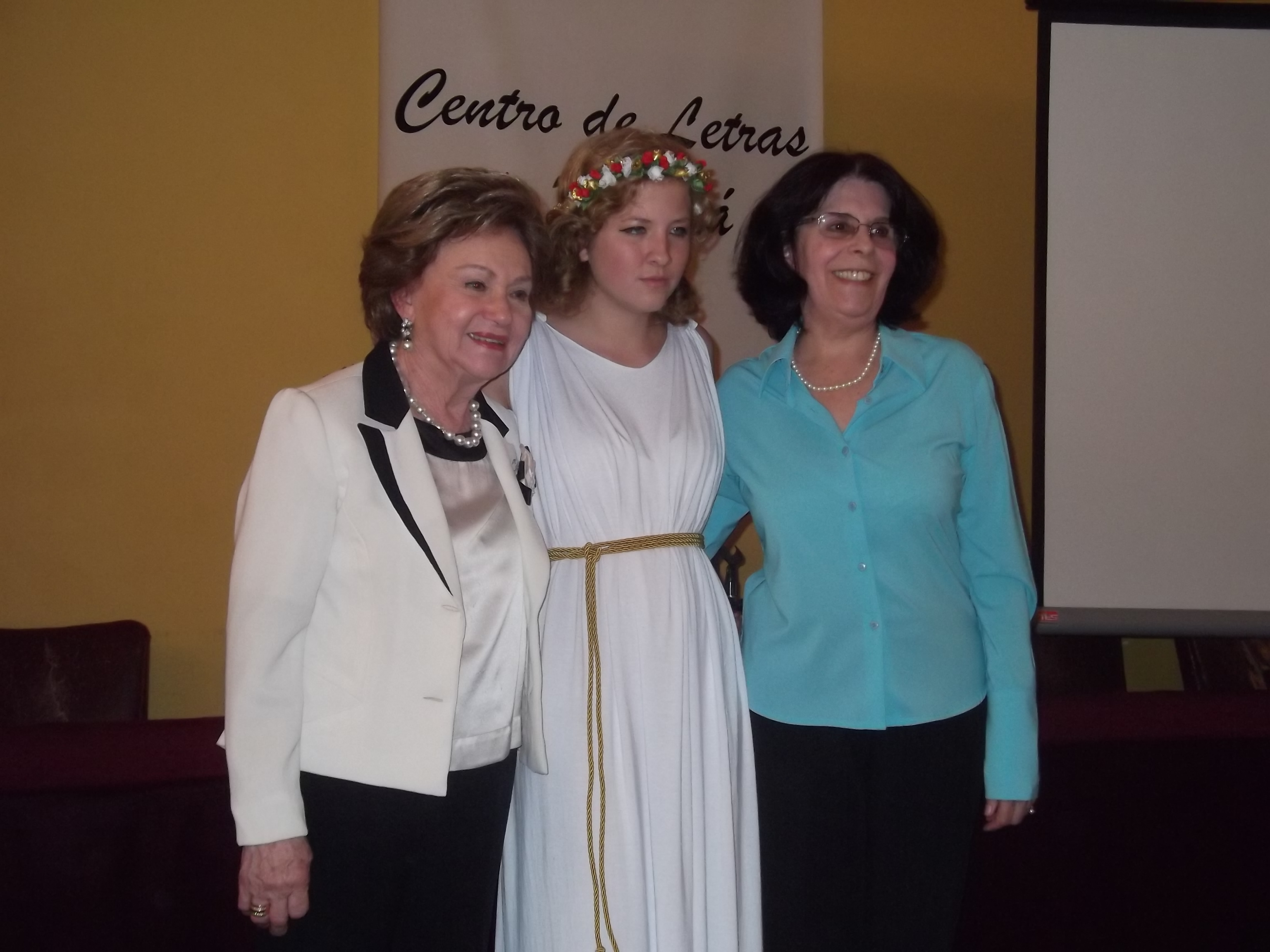 Chloris Casagrande Justen, representante dos integrantes da festa e Tereza Teixeira de Britto